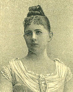 Hilgermann Laura osztrák opera-énekesnő (mezzoszoprán) és énektanár.